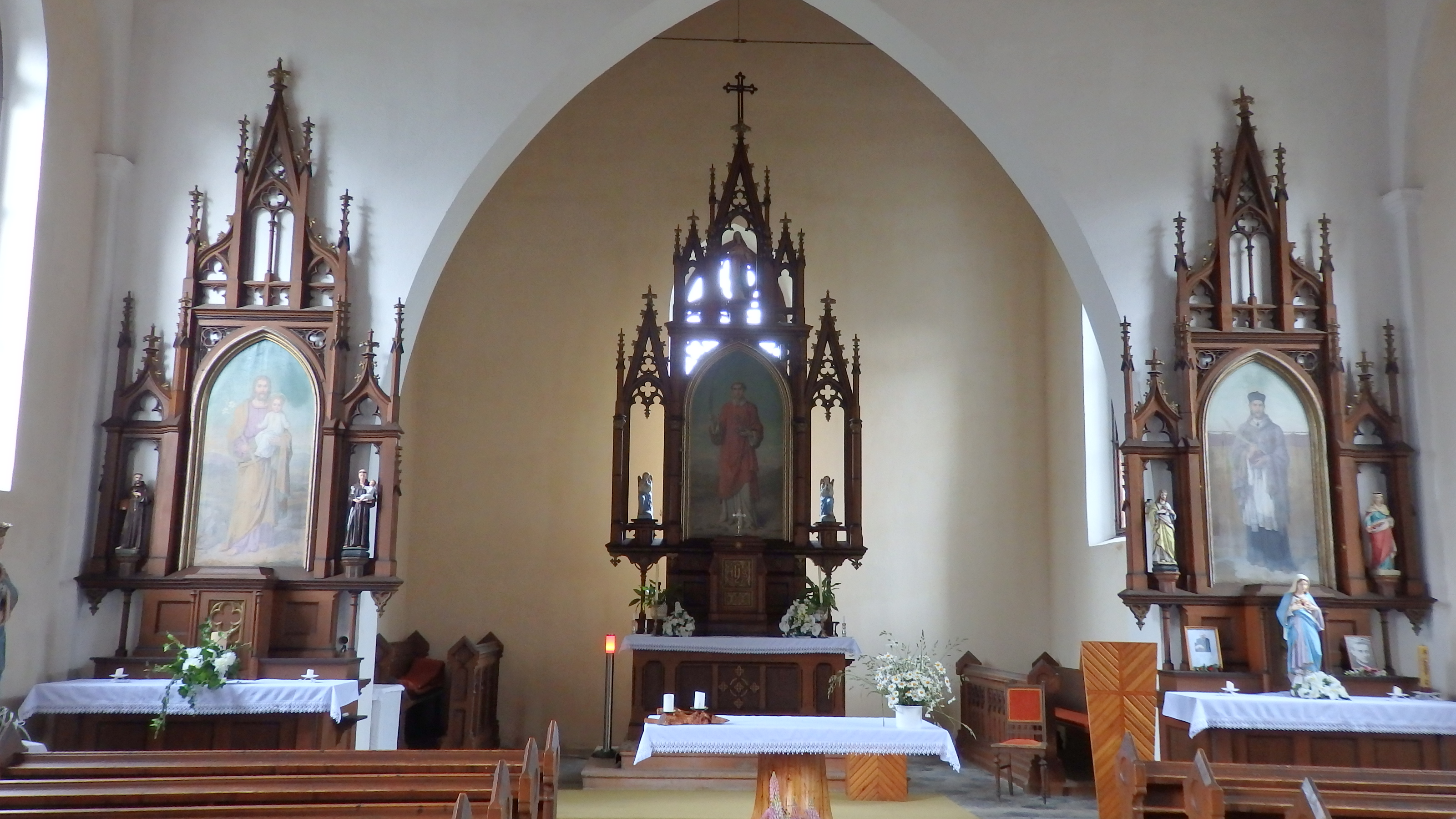 Kvilda, okres Prachatice, interiér kostela sv. Štěpána